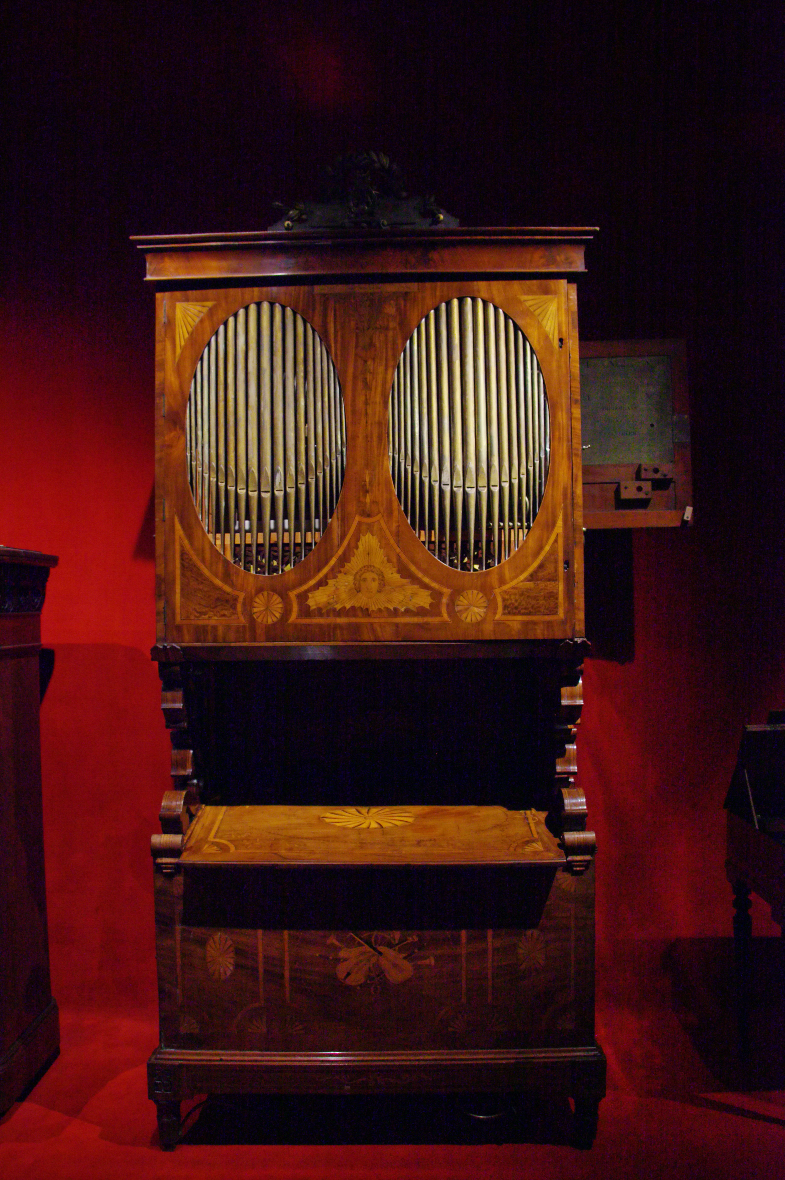 Musical box by Diego Evans, London. Now at the Museu de la Música de Barcelona. Fotografies fetes durant el Backstage pass, el 21-11-2013